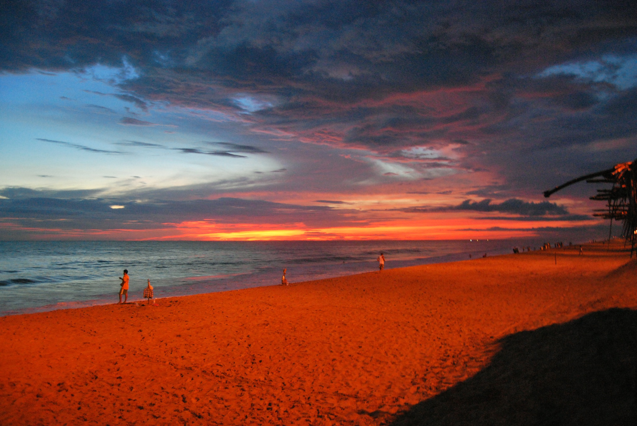 Pie de la Cuesta en Acapulco, Guerrero, México.